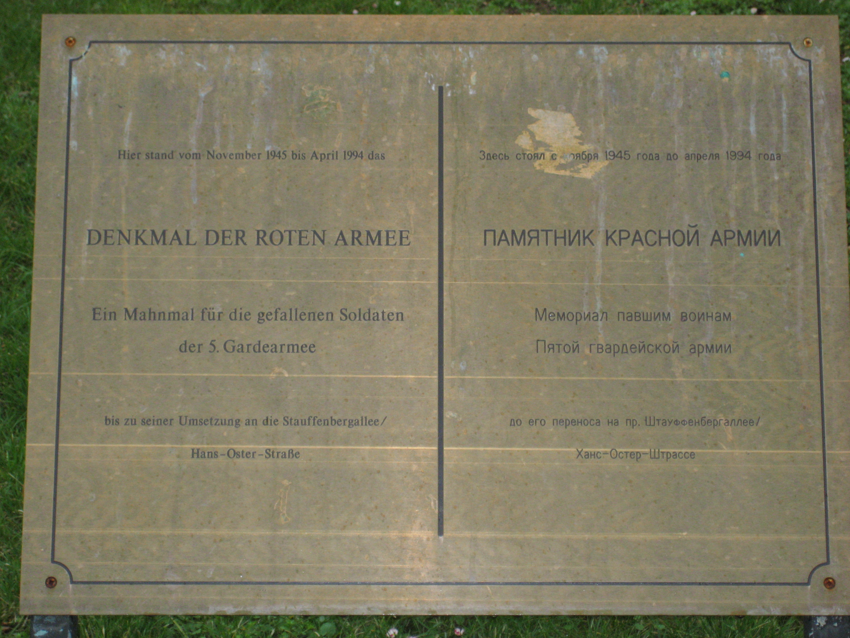 Metadenkmal am Albertplatz, Dresden